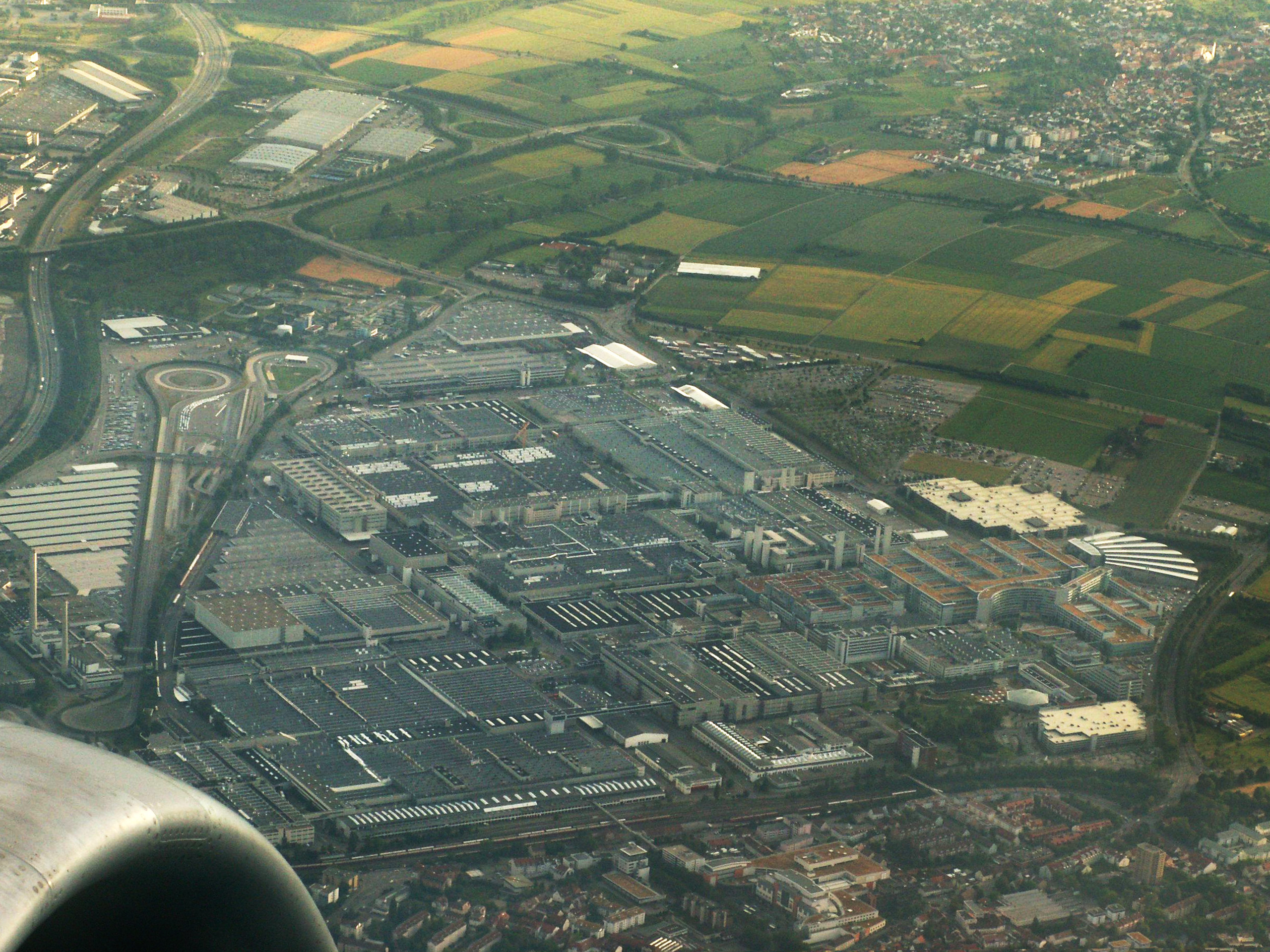 Draufsicht (Luftbild) des Daimler Chrysler Werkes in Sindelfingen photo made by: iggy-x date Jul 2005